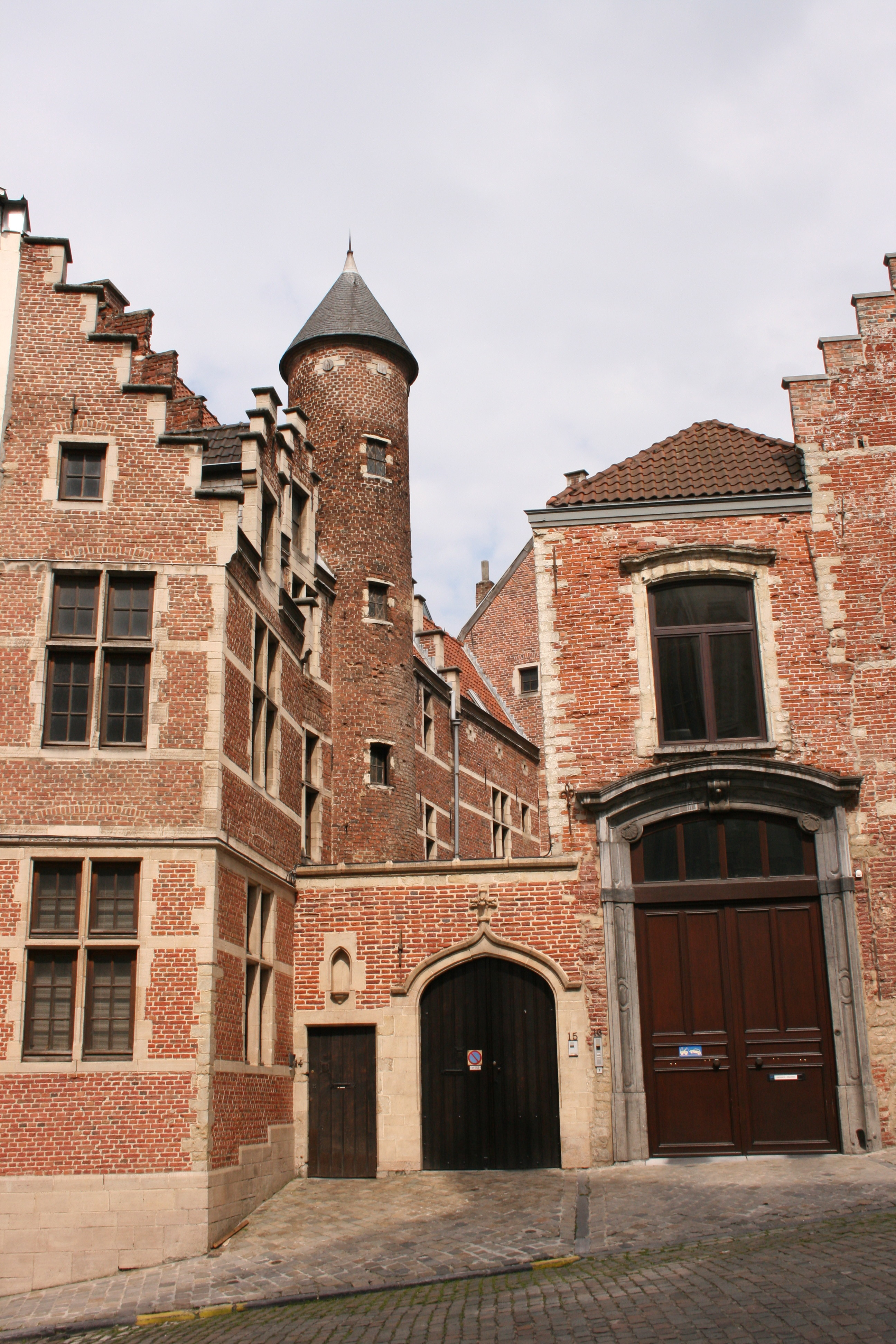 Maison du doyen de la cathédrale Saints-Michel-et-Gudule, rue du Bois Sauvage, Bruxelles, Belgique